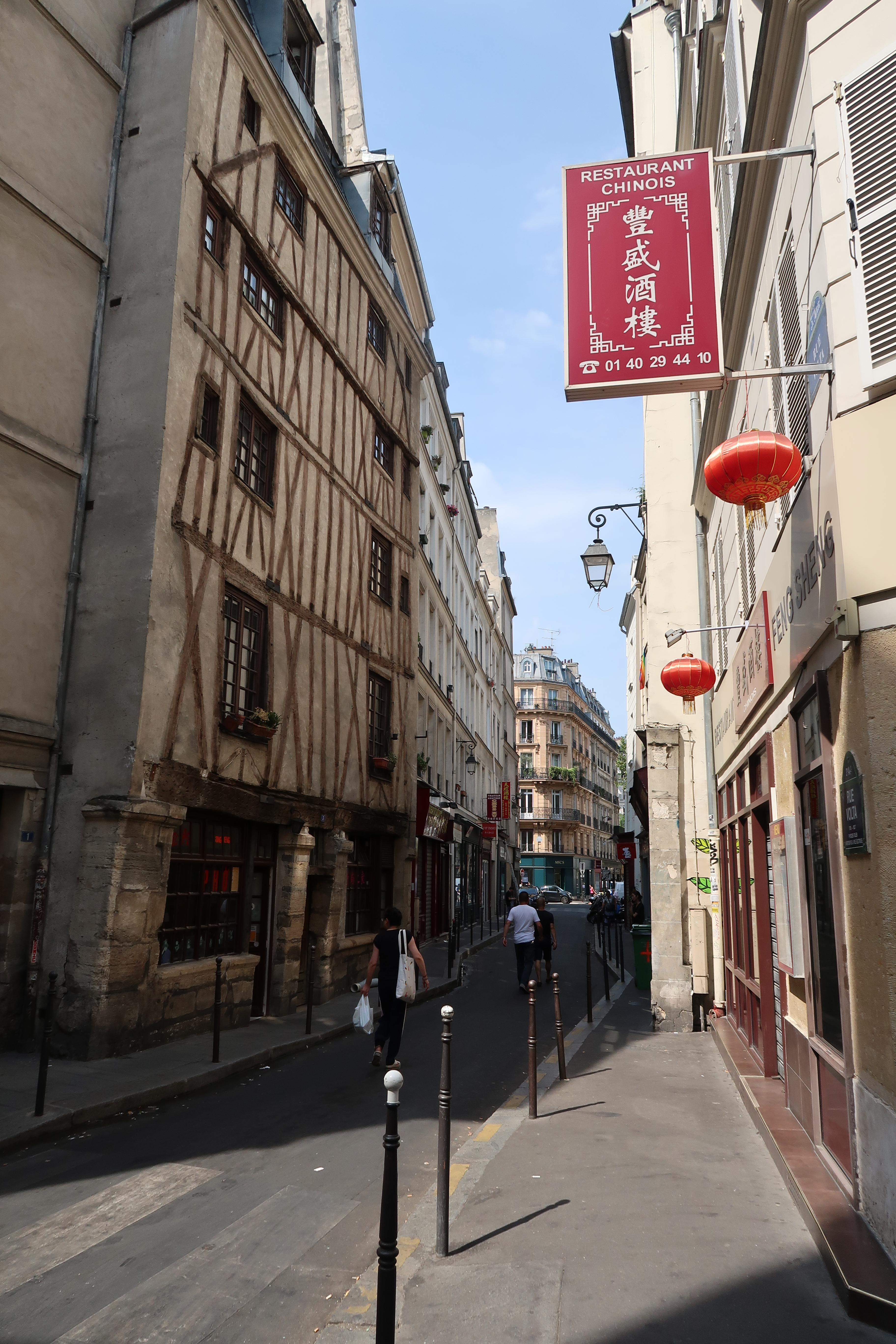 Rue Volta (Paris, 3e).